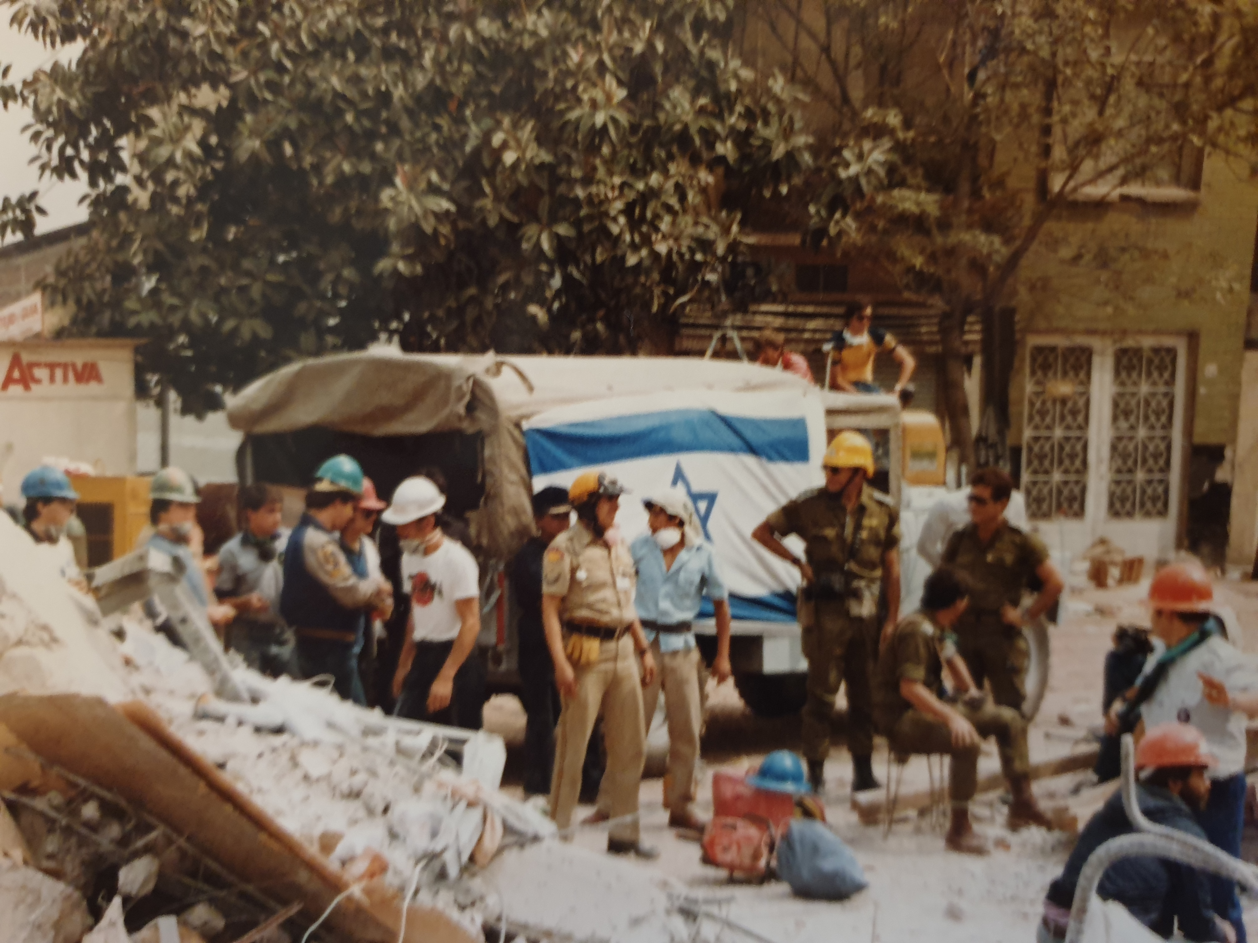 מפקד משלחת צה"ל לרעה"א במקסיקו סיטי, 1985